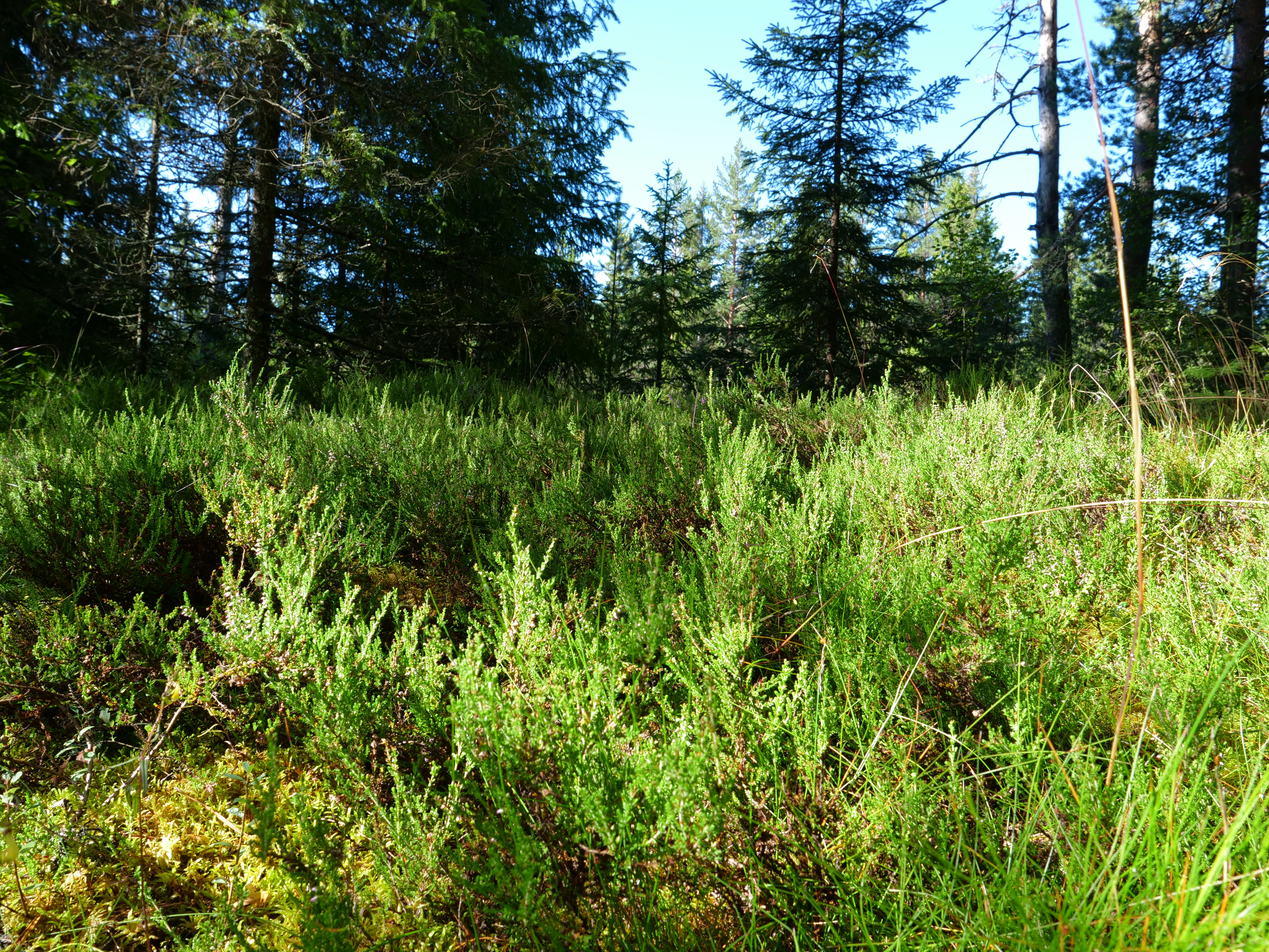 Nadelwald in Schweden in der nähe des Svartälven Flusses.